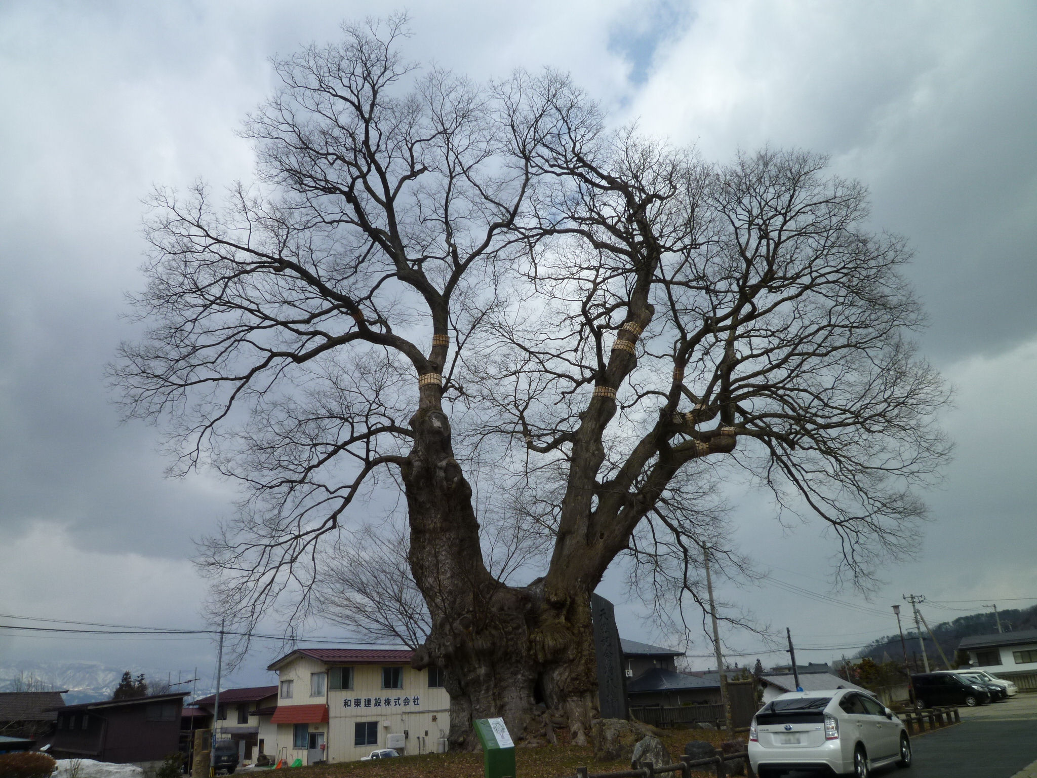 東根の大ケヤキ。国指定特別天然記念物。山形県東根市本丸南、東根小学校敷地内に所在。